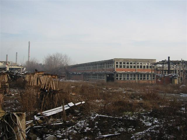 Zerbombte Fabrik "Krusik" in Valjevo/Serbien mit ehem. ca. 7.000 Angestellten. (Hauptarbeitgeber in in der Stadt) Siehe auch: Nato-Luftbild vor der Bombardierung Nato-Luftbild nach einer der vielen Bombardierungen Achten Sie auf das Wohngebiet am Rand der Fabrik (1. Bild u.r. / 2. Bild u.l), das bei der Bombardierung 1999 vollständig zerstört wurde.